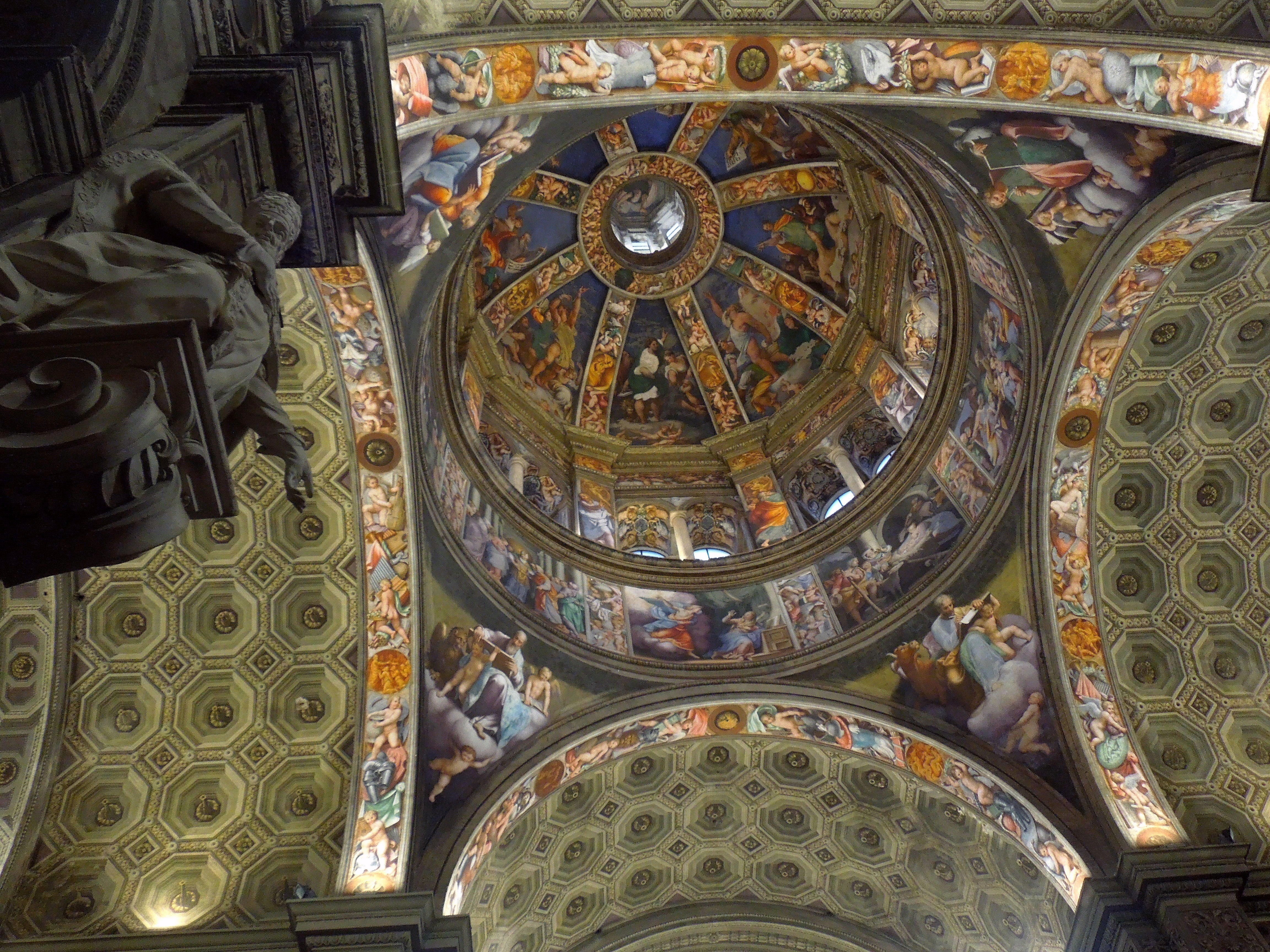 L'interno della Madonna di Campagna. This is a photo of a monument which is part of cultural heritage of Italy.